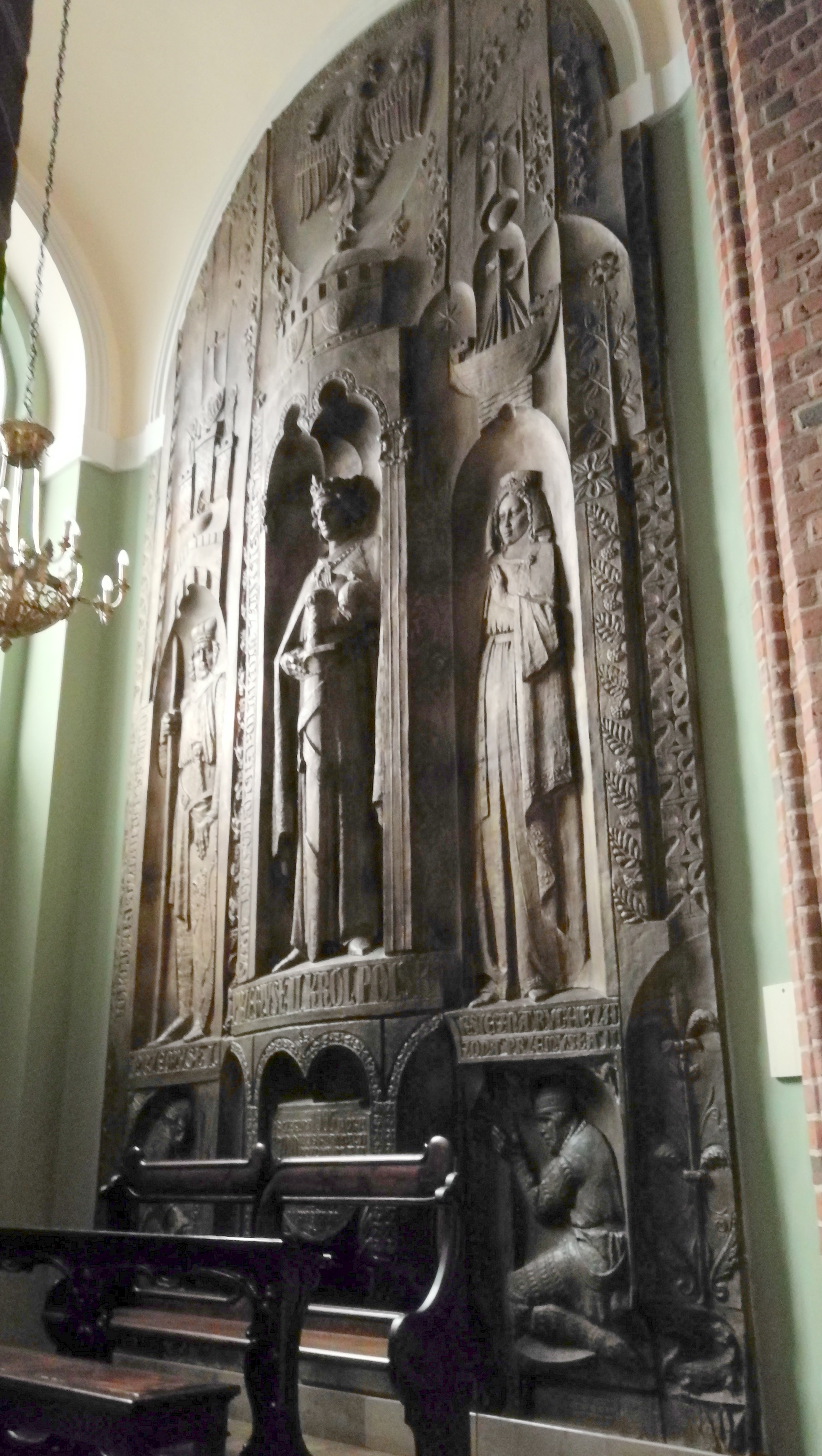 Epitaf (bronz) - Přemysl II. (uprostřed), Přemysl I., Rixi